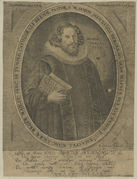 Porträt des Simon Hennings, Pastor in Kopenhagen und Bremen; studierte und lehrte in Rostock. Bestand der Staatsbibliothek zu Berlin; Bilddatei: sbb-006636, Aufnahme-Datum: 2010; Stecher: Caspar Schultze (1651/1700)